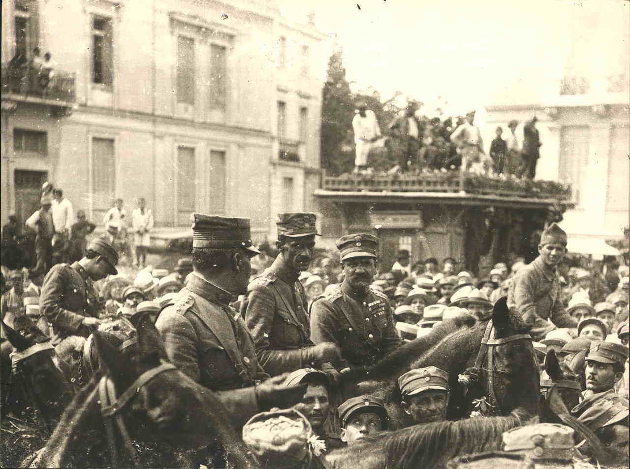 Ο Ν. Πλαστήρας με τον Στυλ. Γονατά και τον Πρωτοσύγκελο και άλλους επι κεφαλής της επαναστάσεως το 1922 εισέρχεται στην Αθήνα.